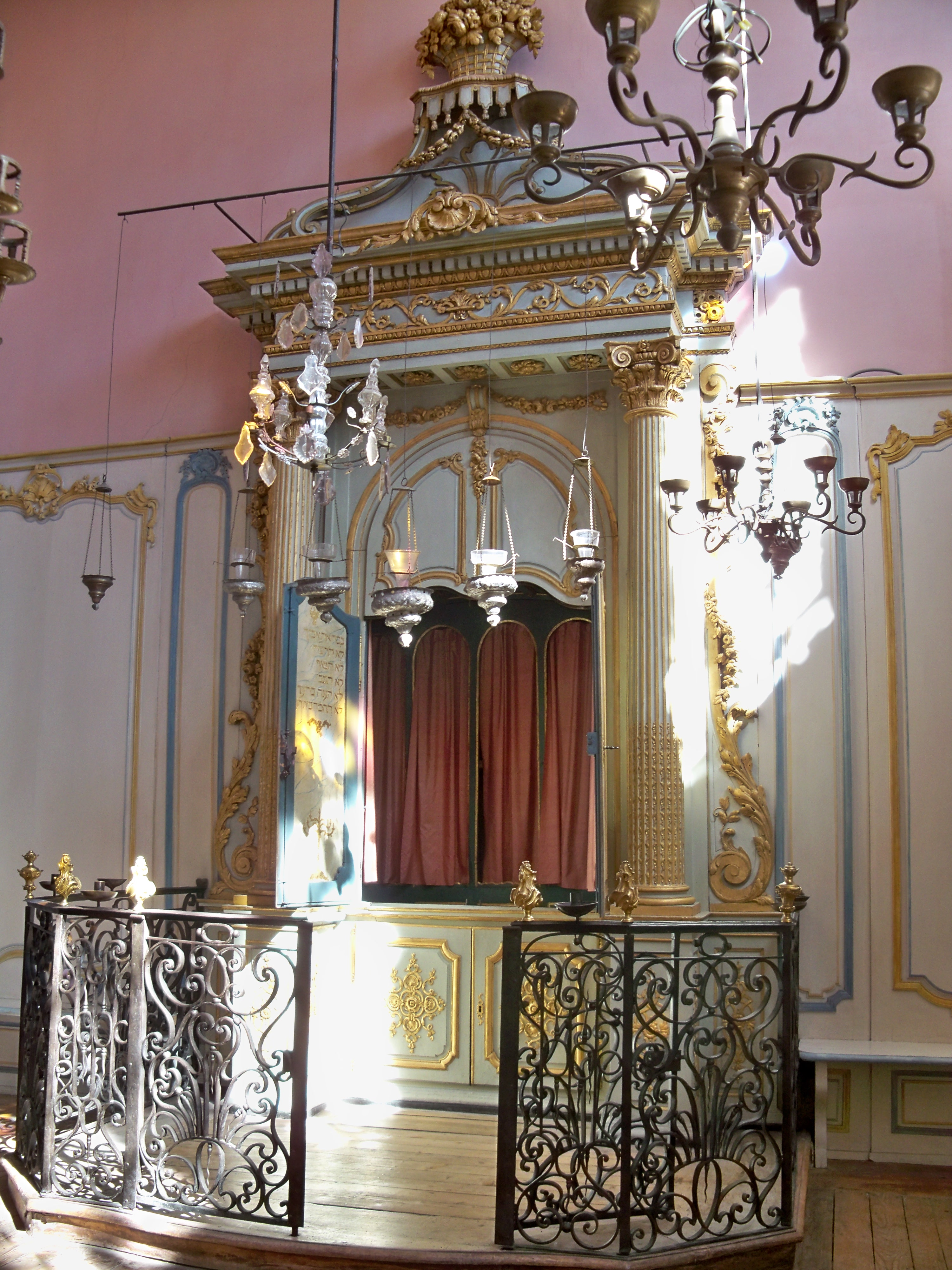 Intérieur de la synagogue de Cavaillon, Vaucluse, France. Tabernacle de Torah et clôture en fer forgé